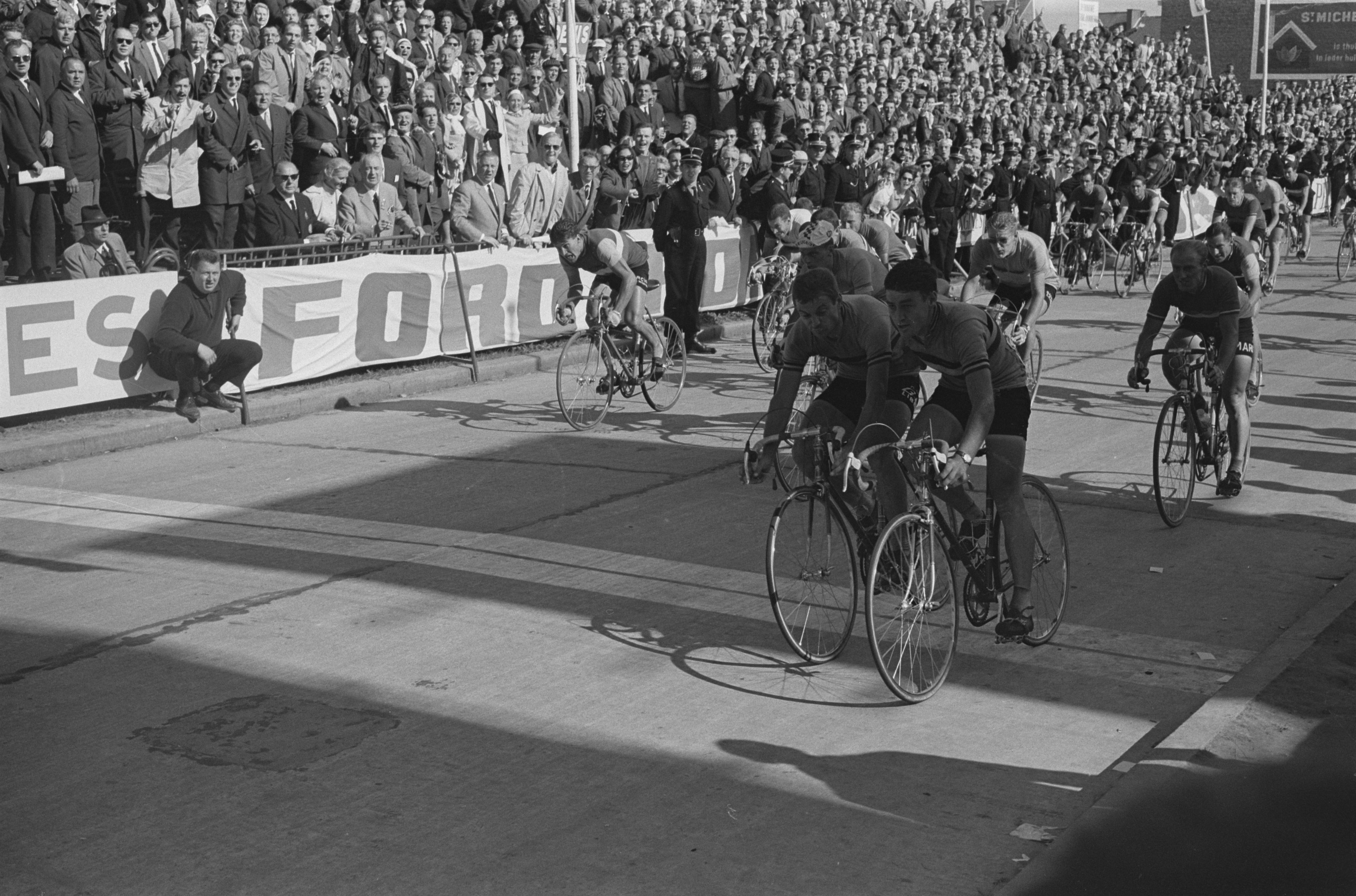 Collectie / Archief : Fotocollectie Anefo Reportage / Serie : [ onbekend ] Beschrijving : Wereldkampioenschappen wielrennen te Ronse. Profs. Finish rechts op voorgrond Beheyt (1e) en Rik van Looy (2e) daarachter Jo de Haan (met wit petje, 3e) Annotatie : [onbekend] Auteursrechthebbende : Nationaal Archief Materiaalsoort : Negatief (zwart/wit) Nummer archiefinventaris : bekijk toegang 2.24.01.05 Bestanddeelnummer : 915-4187